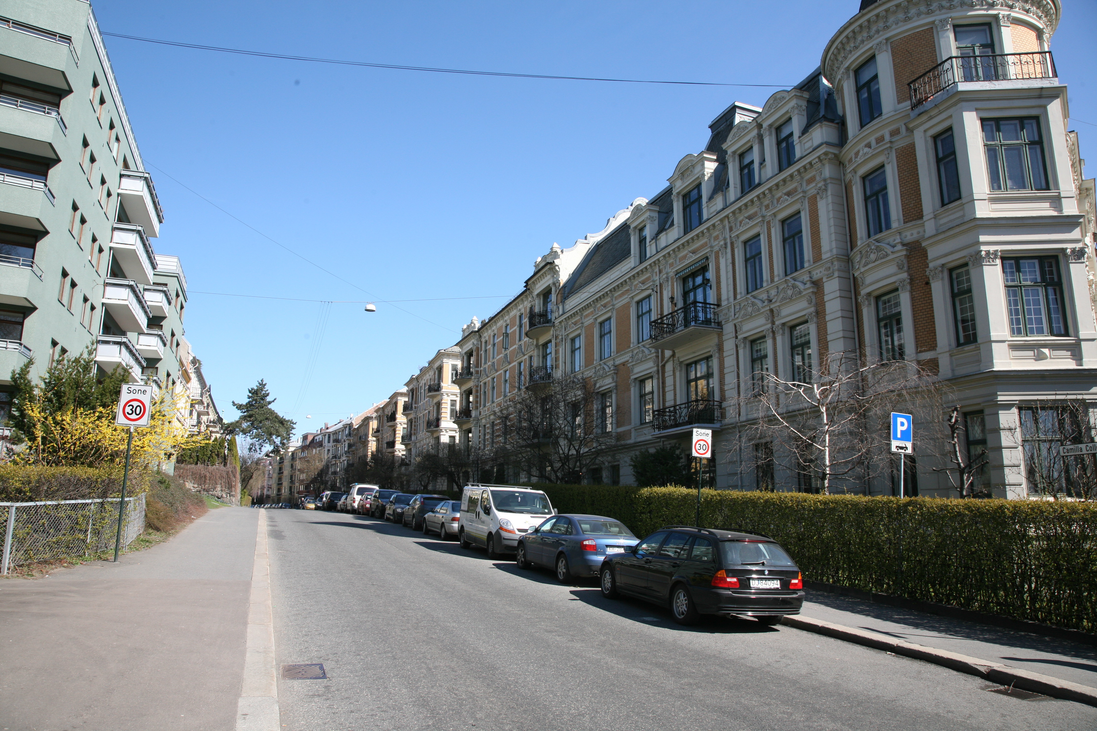 From Camilla Colletts vei in Oslo, Norway